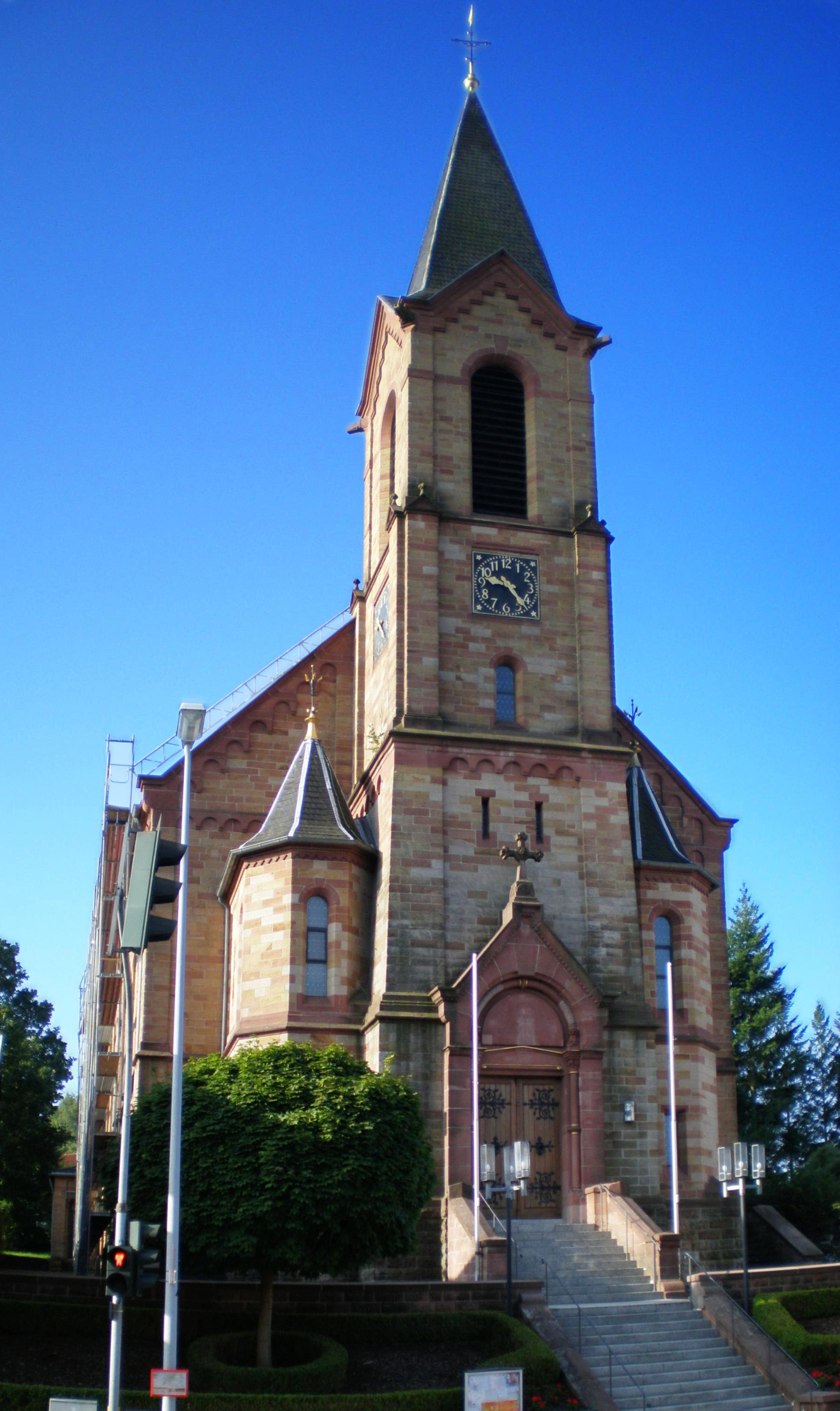 Kath. Kirche in Rohrbach (Saar)